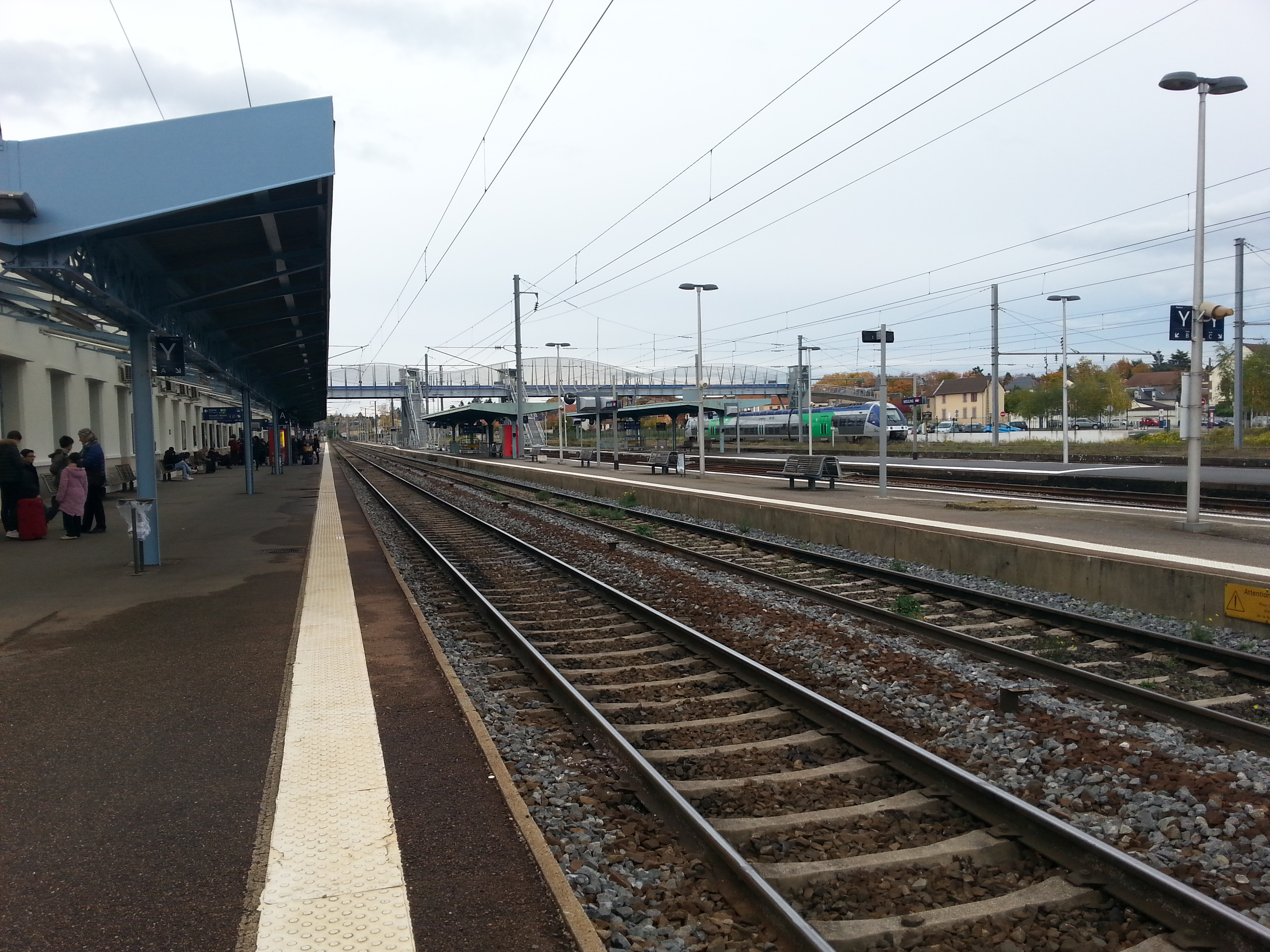 Quai A de la gare de Moulins-sur-Allier.